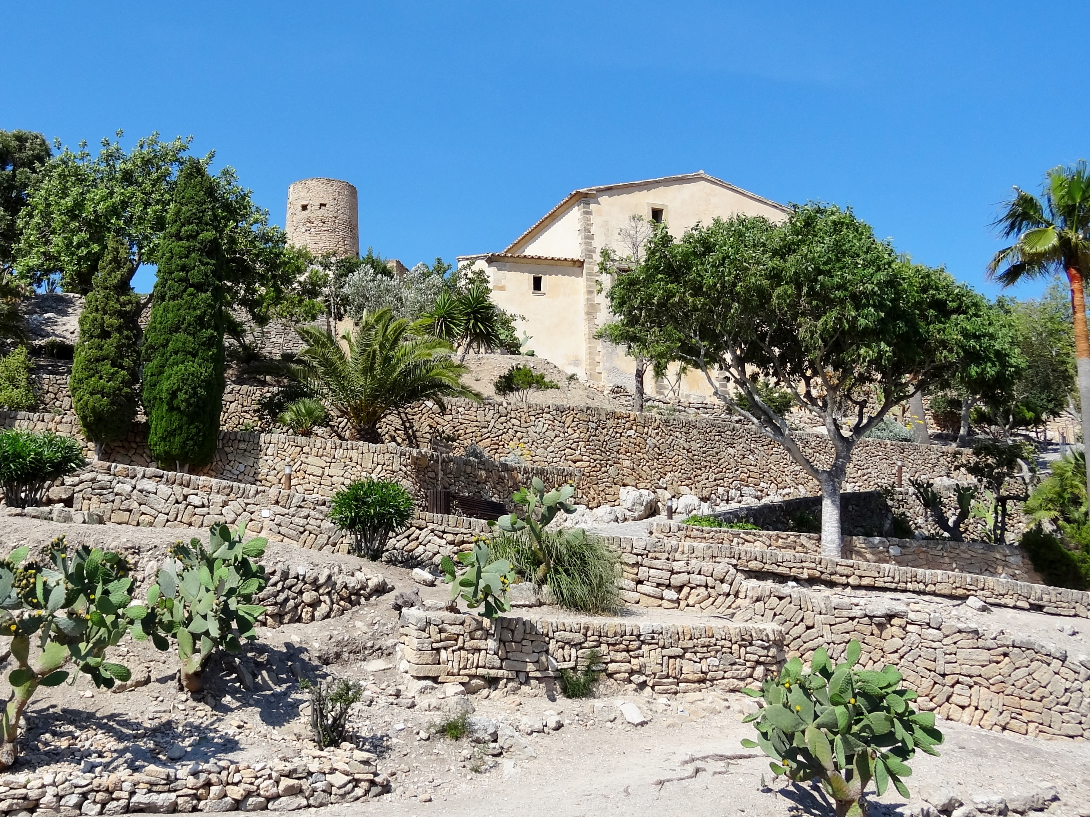 Castell de Capdepera, Gemeinde Capdepera, Mallorca, Spanien